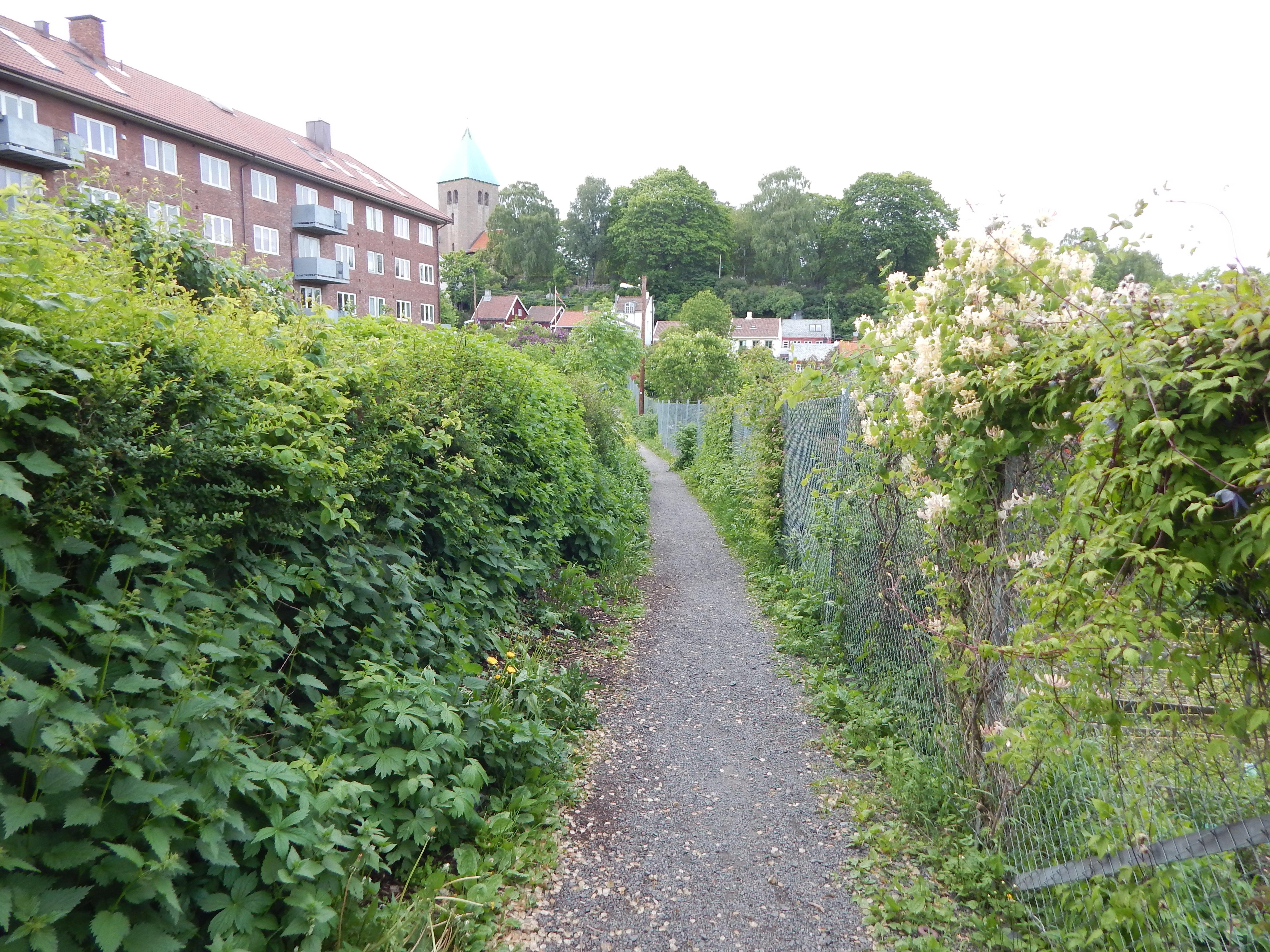 Kjærlighetsstien mellom Telthusbakken og Maridalsveien